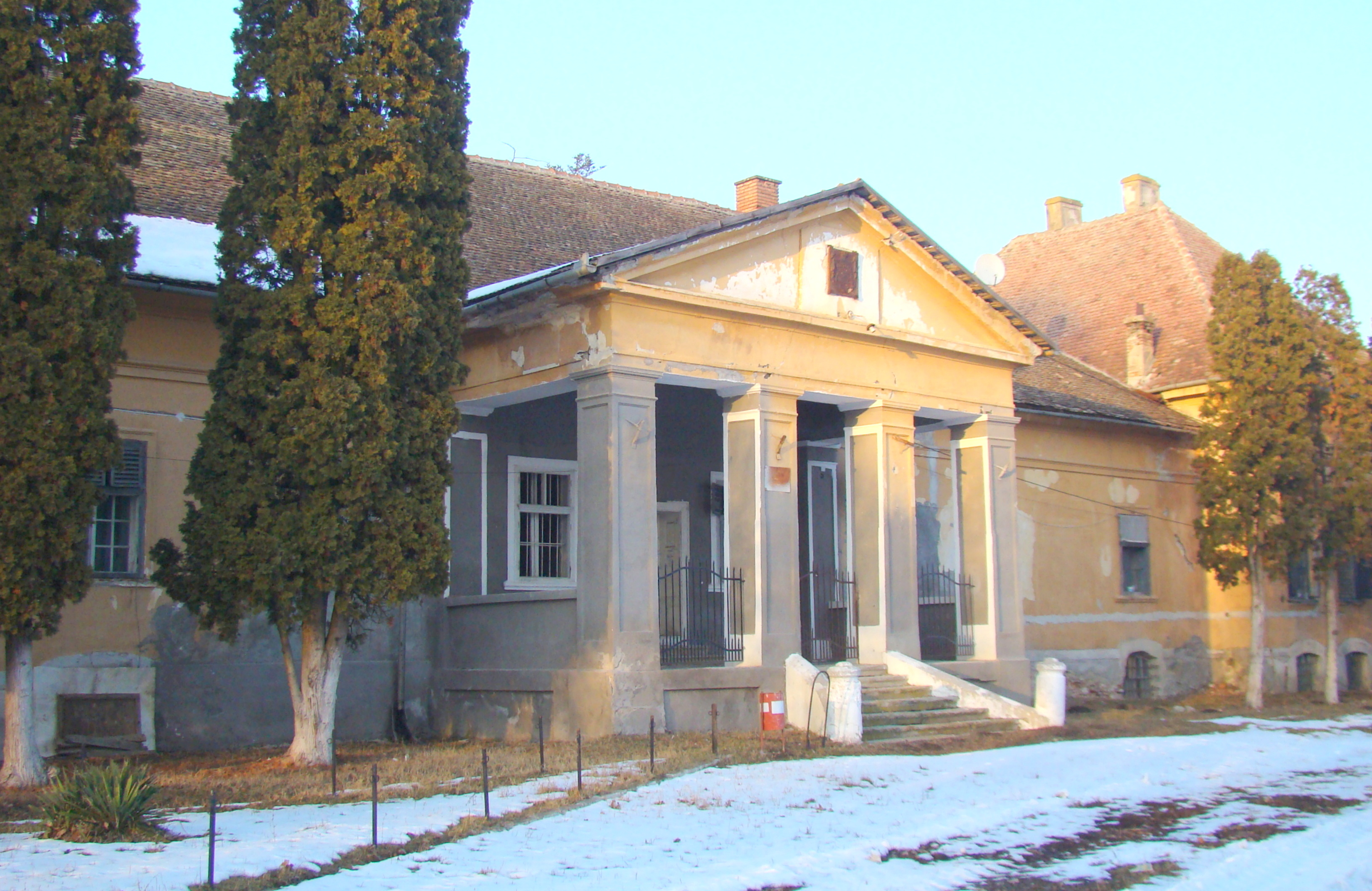 Castelul Degenfeld din satul Cuci, comuna Cuci, judeţul Mureş